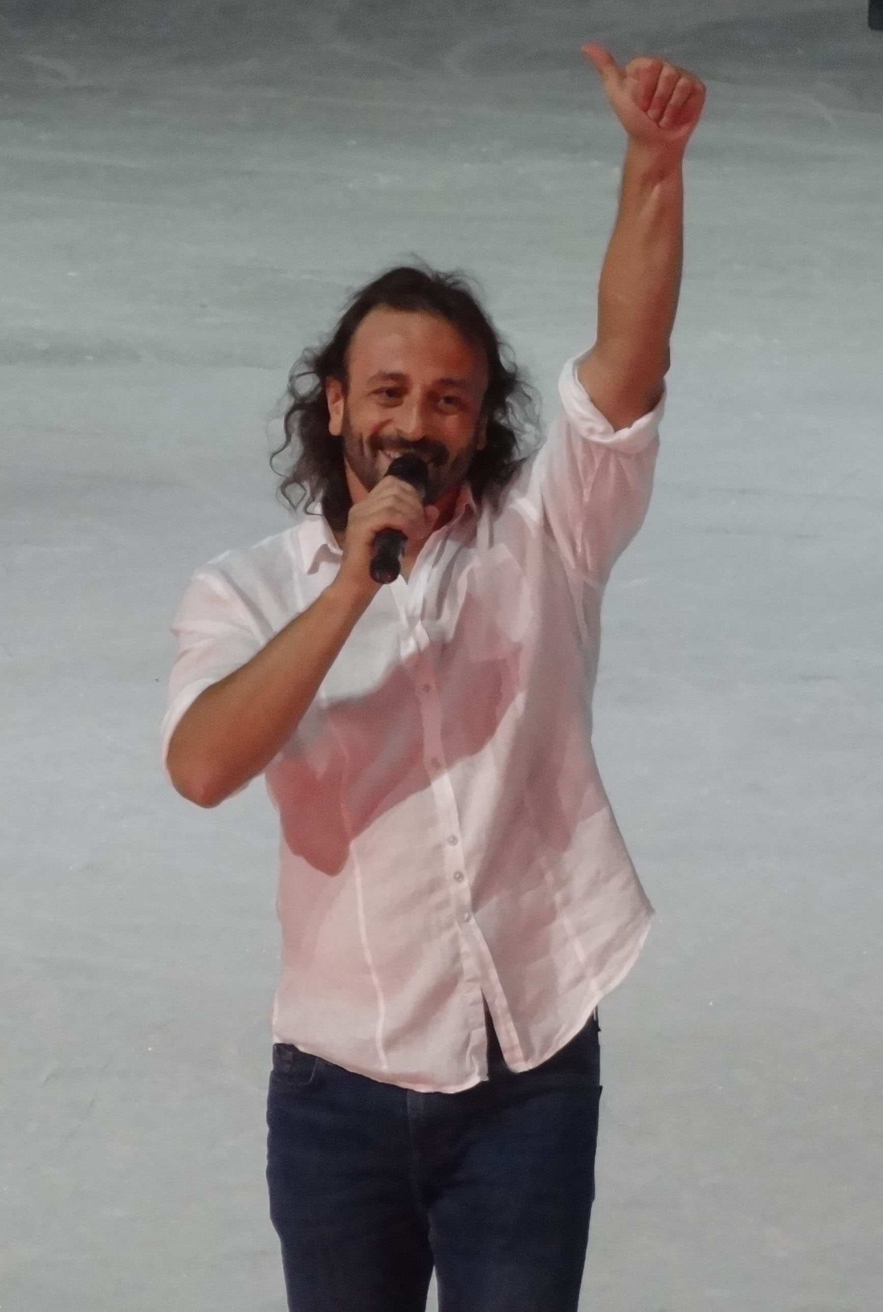 Илья Авербух, Сочи, (Ледовое шоу "Кармен") 2015.